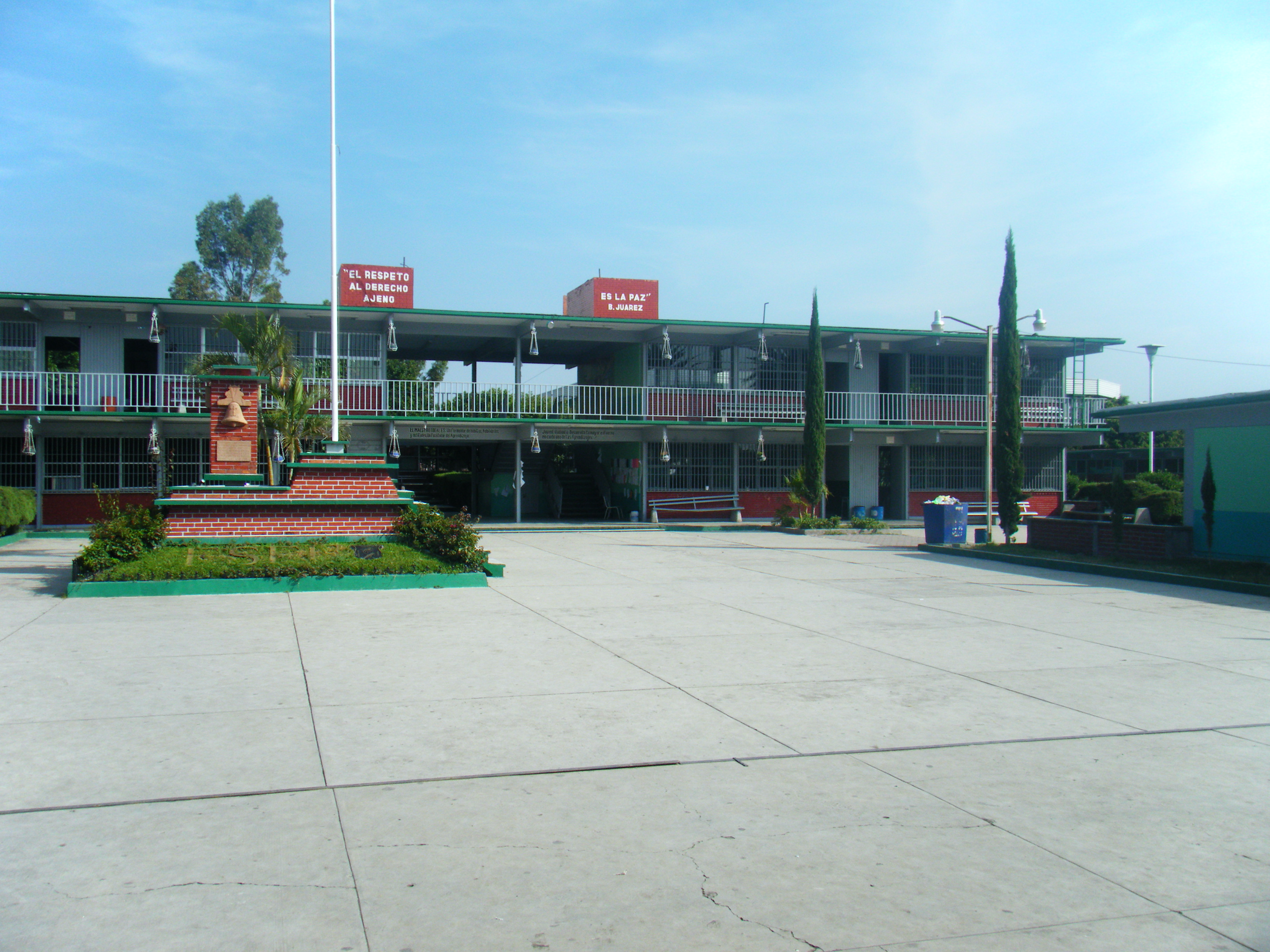 ESFU 10 Jose Vasconcelos de Uriangato